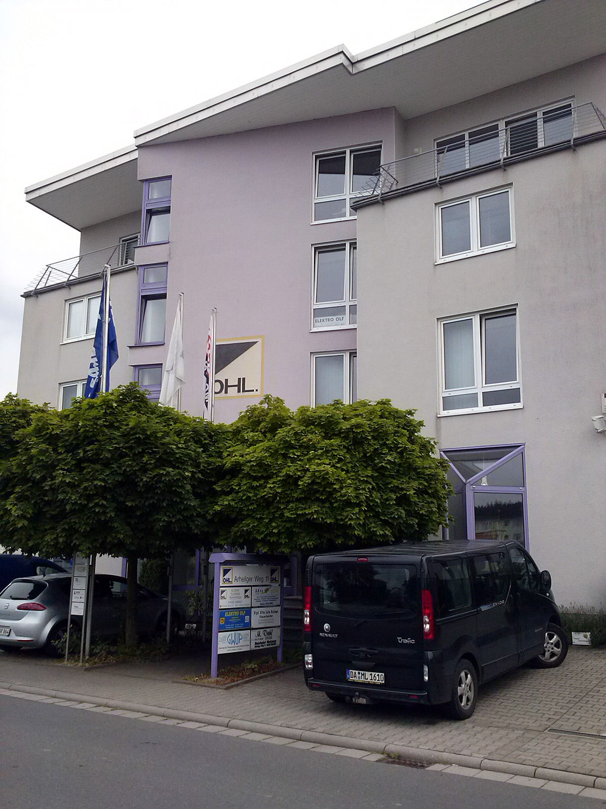 Der Sitz der Gesellschaft zur wissenschaftlichen Untersuchung von Parawissenschaften (GWUP) in Roßdorf bei Darmstadt.